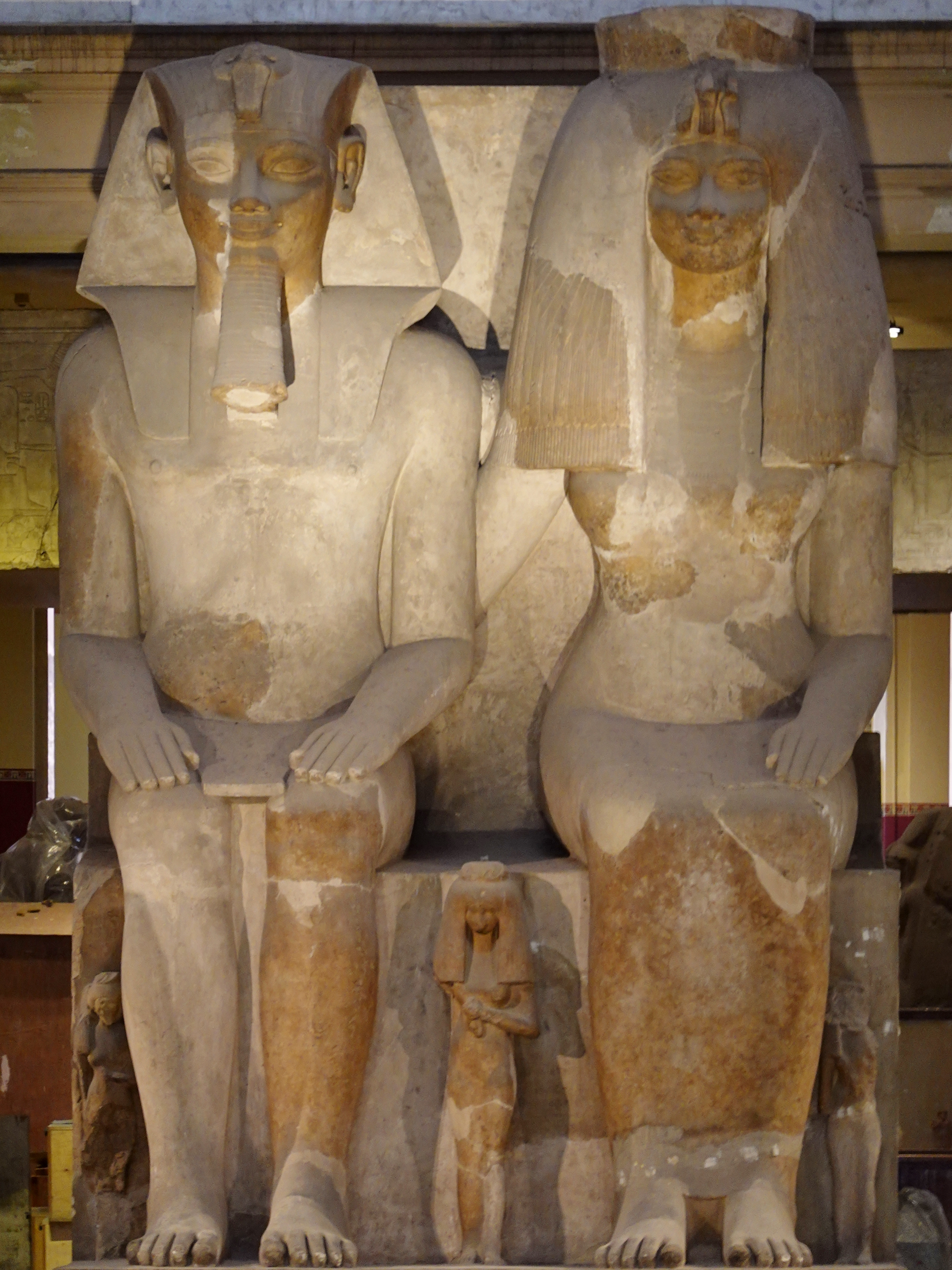 Sitzstatuen des Königs Amenophis III. und seiner Ehefrau Teje, zu ihren Füßen die drei Töchter Henuttaneb, Nebetah und eine weitere (Höhe: 700 cm, Kalkstein, 18. Dynastie), gefunden 1859 durch Auguste Mariette in Medinet Habu, ausgestellt im Ägyptischen Museum in Kairo, Ägypten